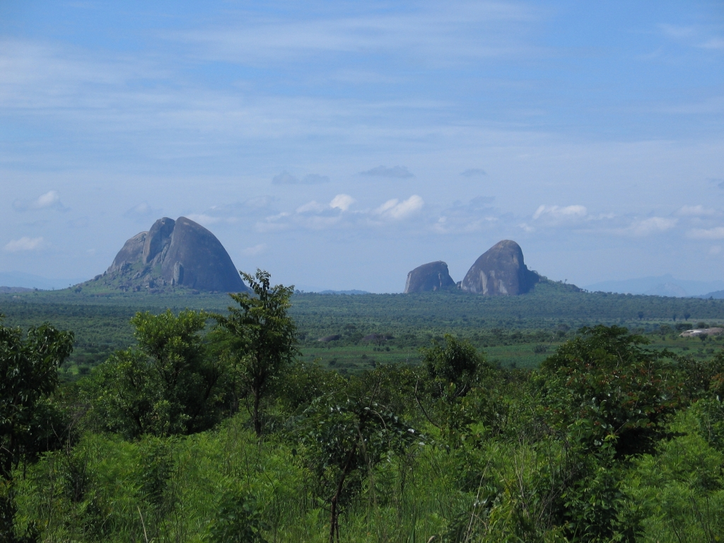 Afloramentos rochosos criam uma paisagem estranha (Estrada Huambo-Dondo, Angola)